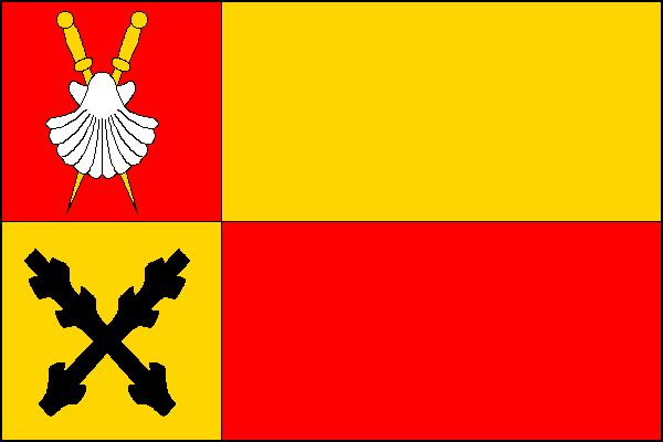 Vlajka obce Horní Libchava